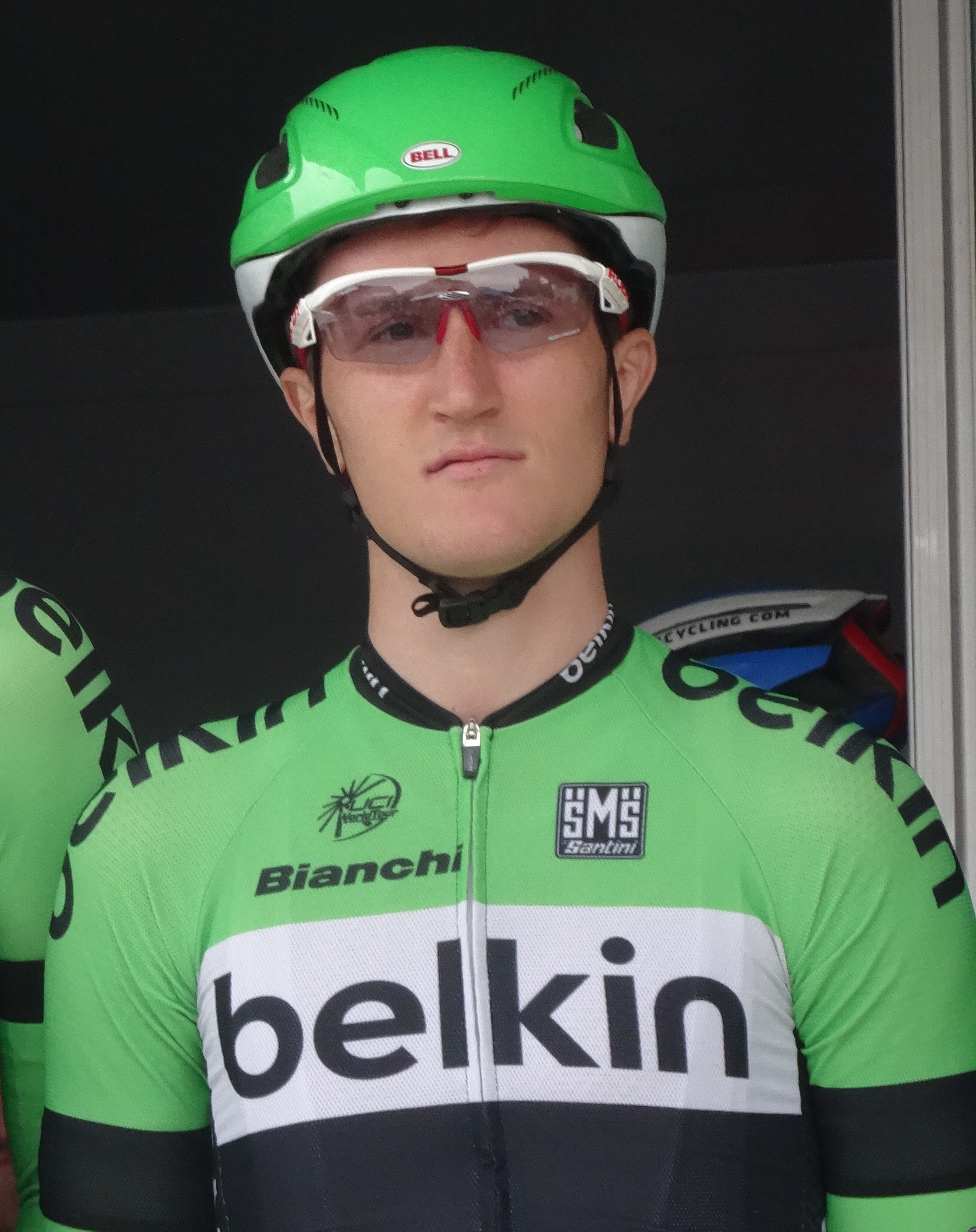 Reportage photographique réalisé le mercredi 24 septembre à l'occasion du départ et du début de la course du Circuit du Houtland 2014 à Lichtervelde, Belgique.